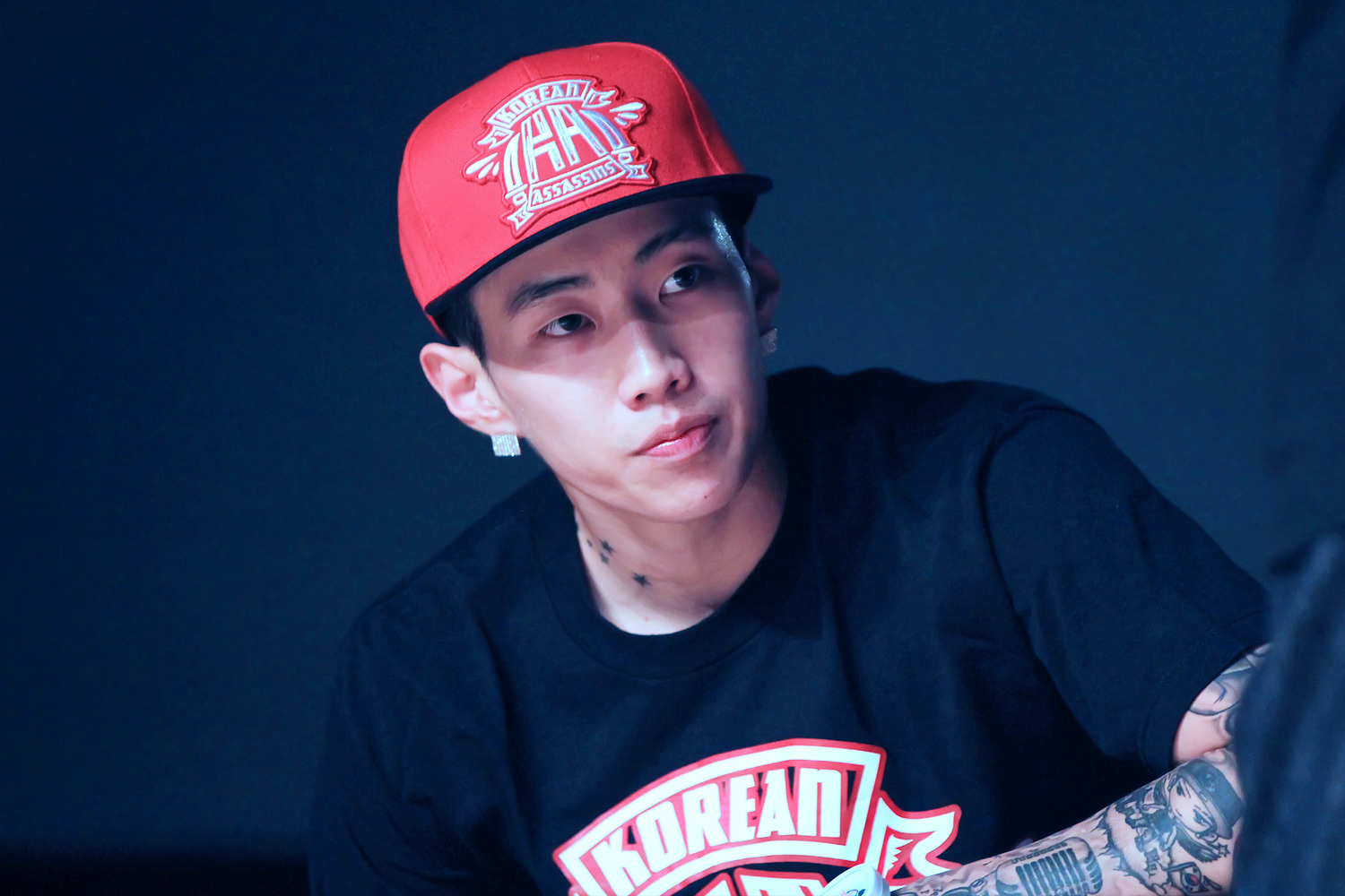 Jay Park at R-16 Korea 2012.